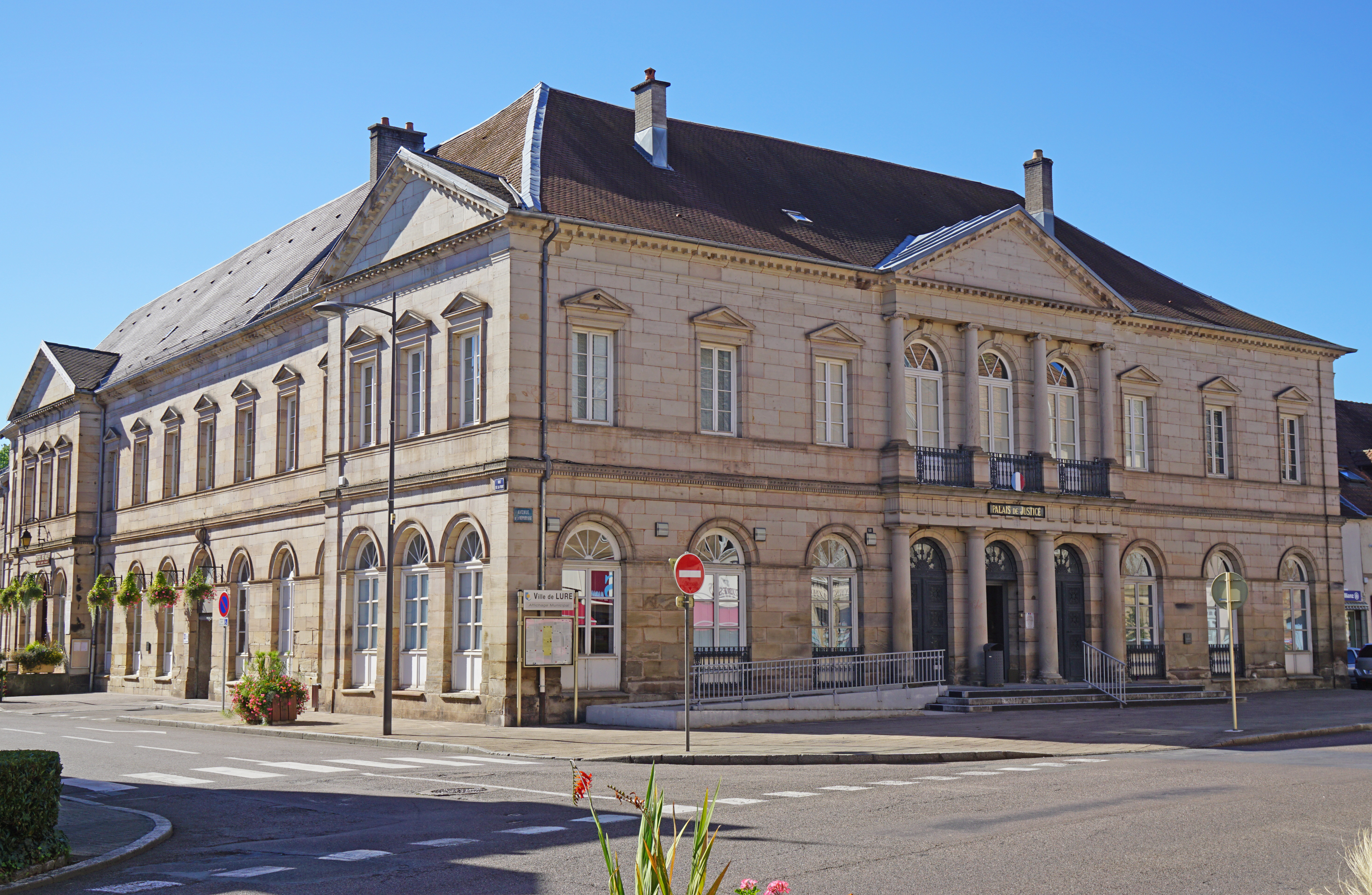 Le bâtiment du palais de justice de Lure est couplée avec celui de la mairie.